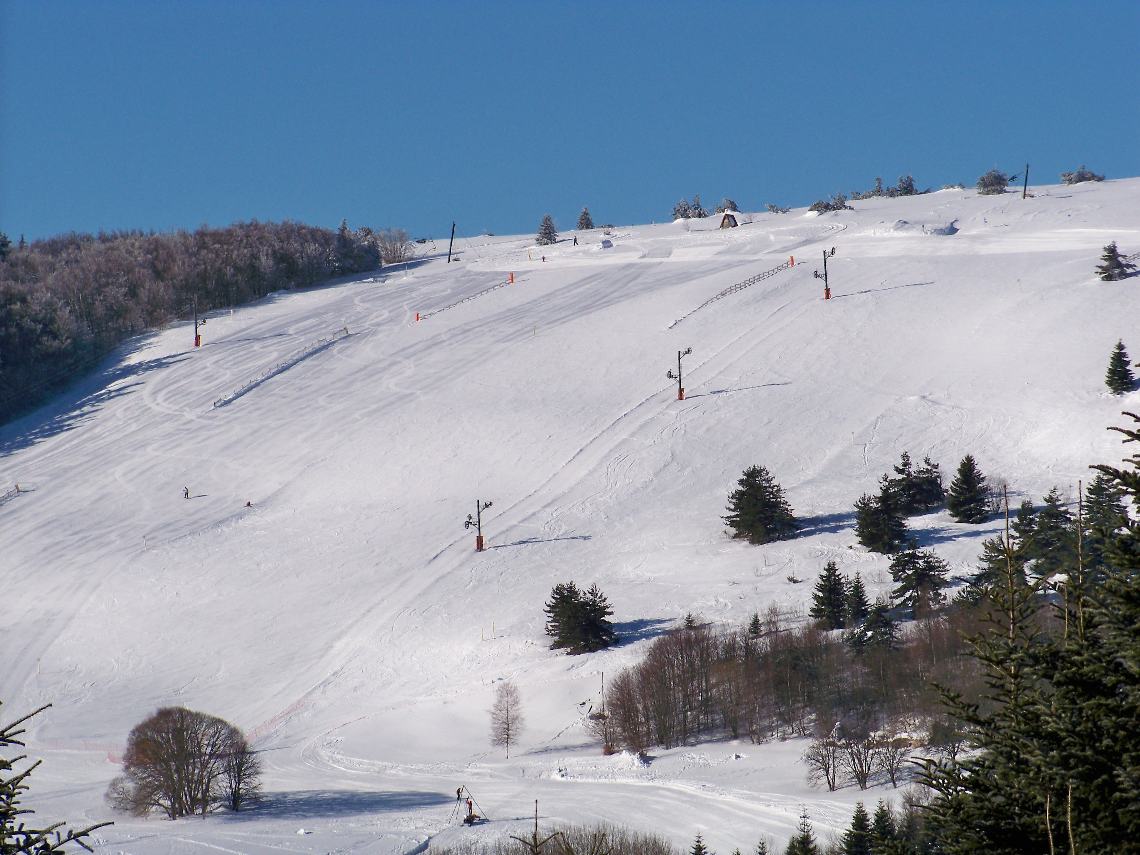 Vue de la station de Prabouré au loin.